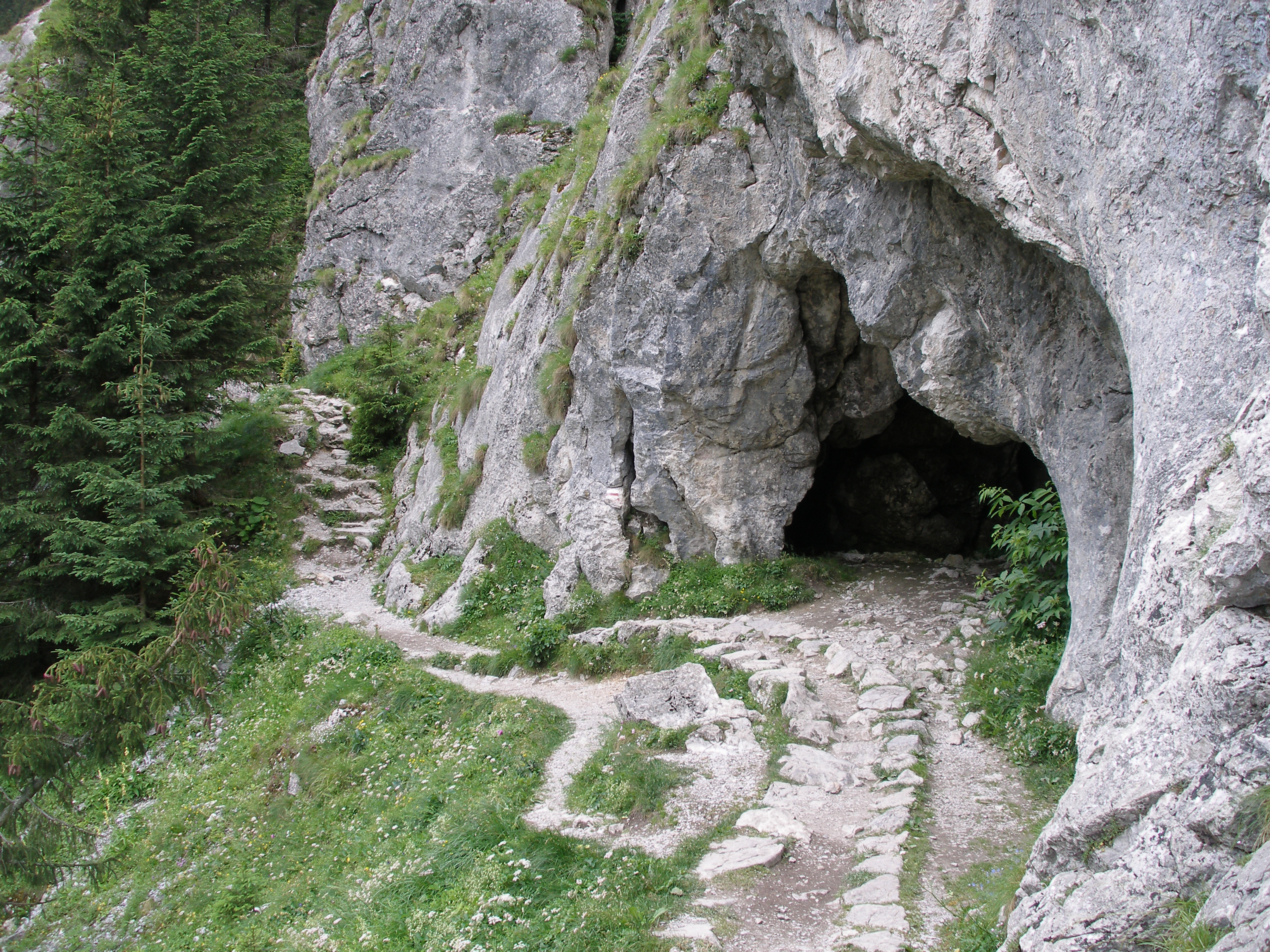 Otwór Jaskini Obłazkowej w Dolinie Kościeliskiej.